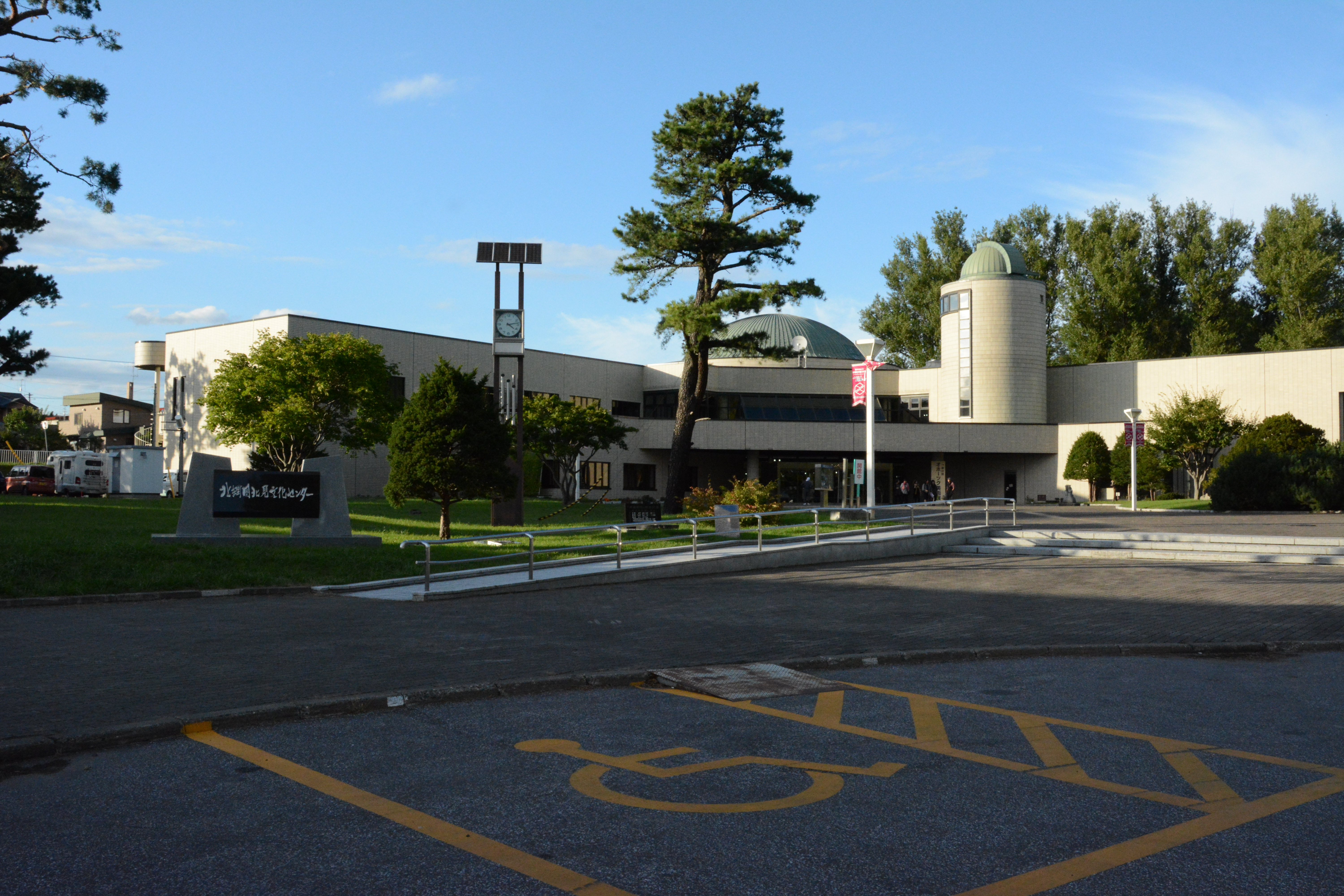 北網圏北見文化センター 正面